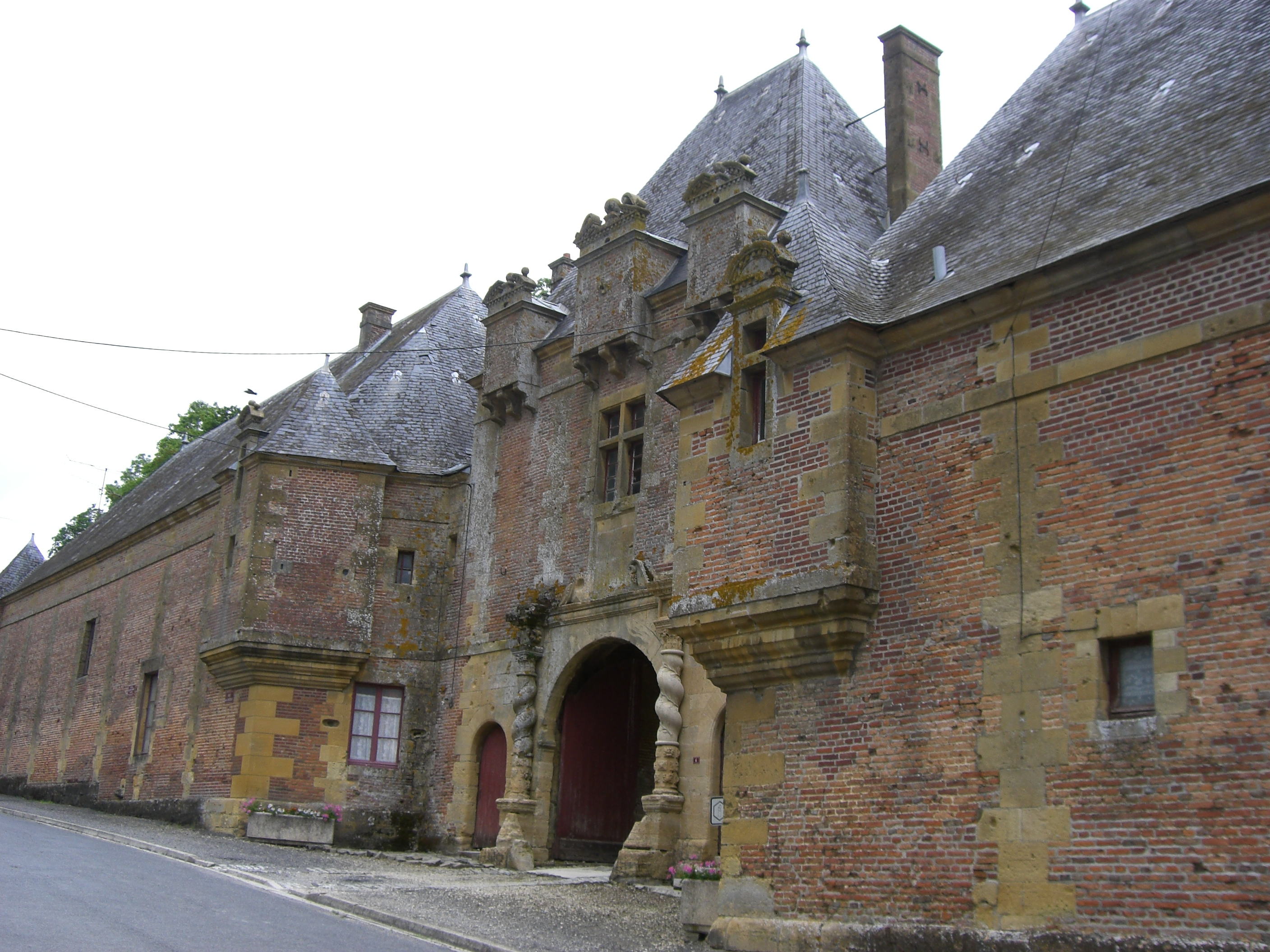 Château de Grandpré (Ardennes, France)